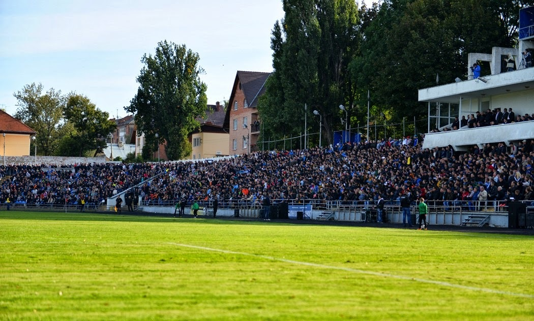 Стадион «Буковина» (город Черновцы, Украина)